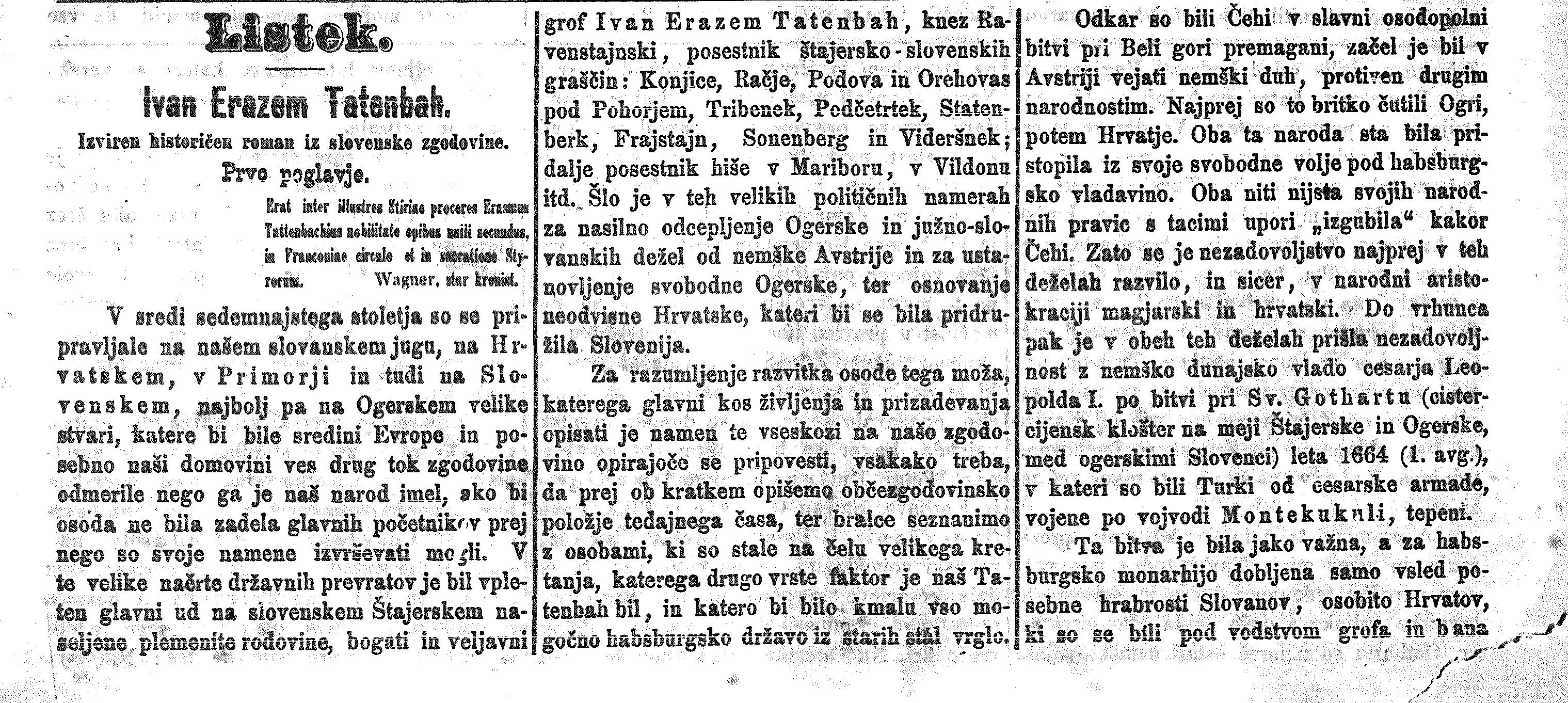 Skeniran izsek iz časopisa Slovenski narod iz NUK-a. Besedilo predstavlja prvi del romana Ivan Erazem Tattenbach Josipa Jurčiča iz leta 1873. Zaradi starosti so ji avtorske pravice potekle.